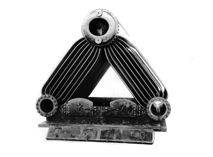 Foto. Album is aangeboden aan Zijne Excellentie Gouverneur-Generaal Mr. D. Fock ter gelegenheid van zijn bezoek aan de fabrieken der Nederlandsch-Indische Industrie te Soerabaia. Een waterpijpketel voor de marine gebouwd door de N.V. Nederlandsch Indische Industrie te Soerabaja